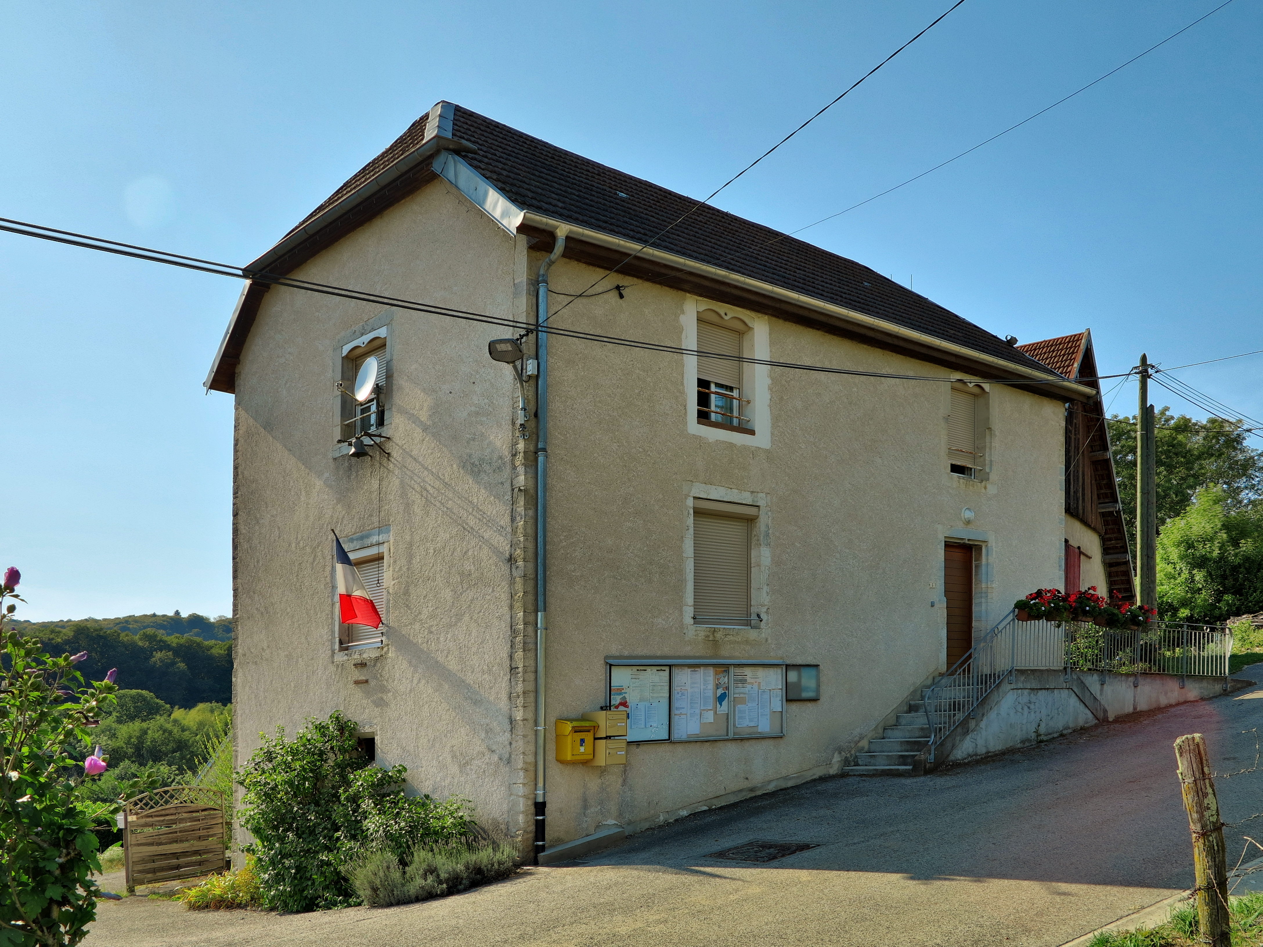 La mairie